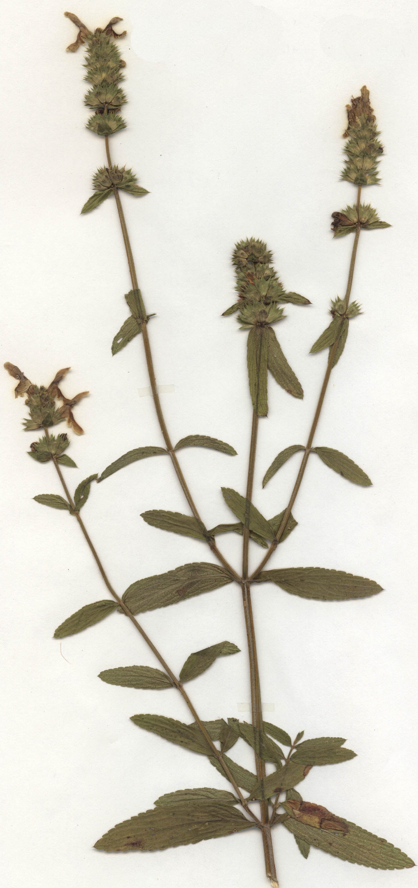 Stachys recta, eigener Herbarbeleg von 1987, Unterfranken